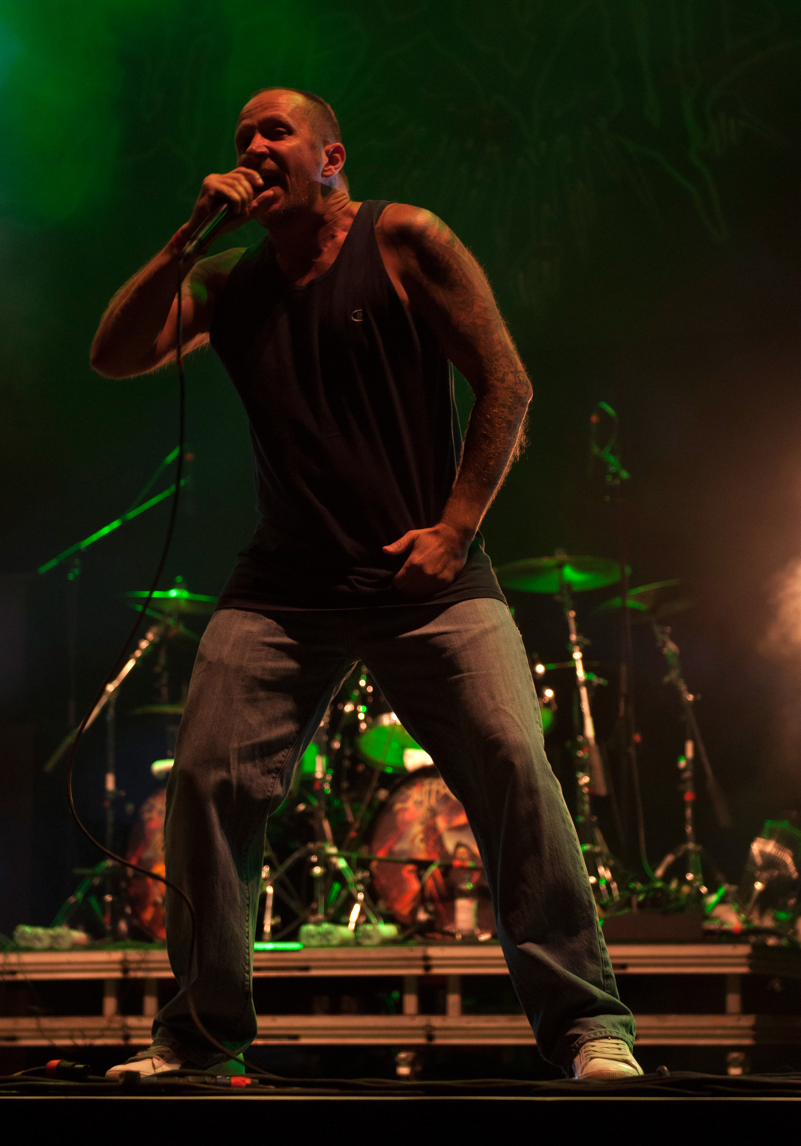 Suffocation at Party.San Open Air 2014